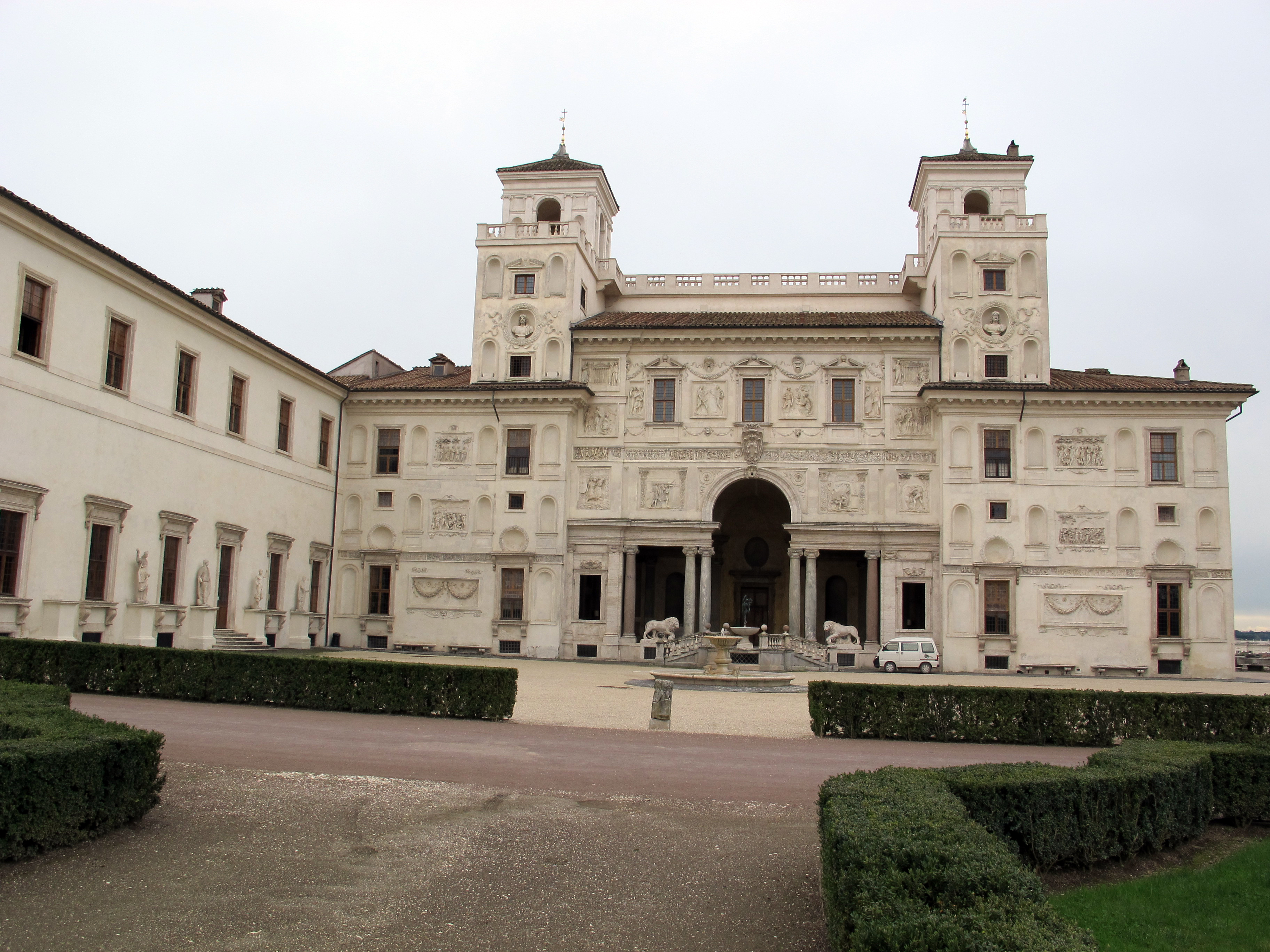 Villa Medici, Roma